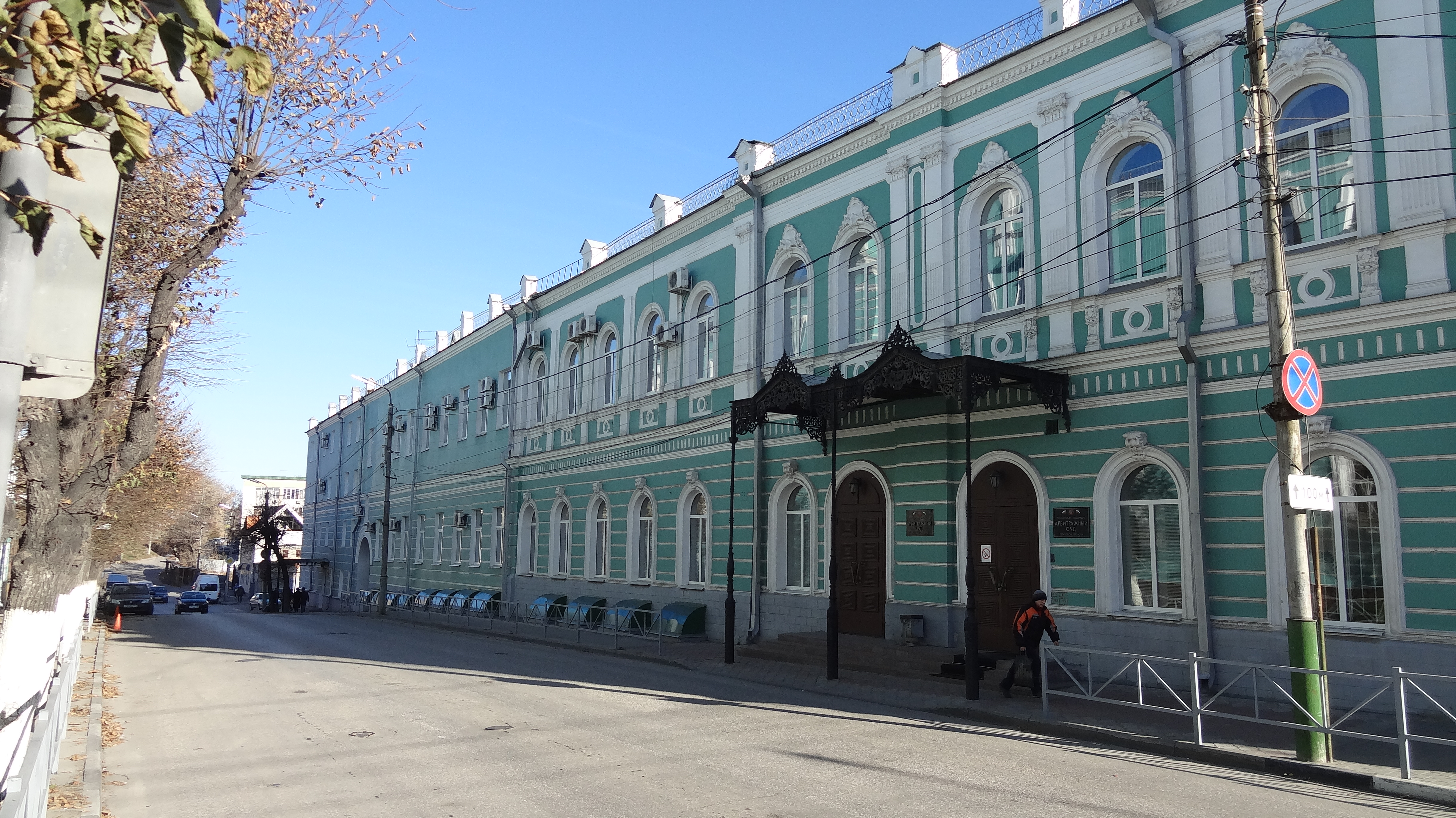 Здание государственного банка (Рязанская область, Рязань, улица Подбельского, 43/44)